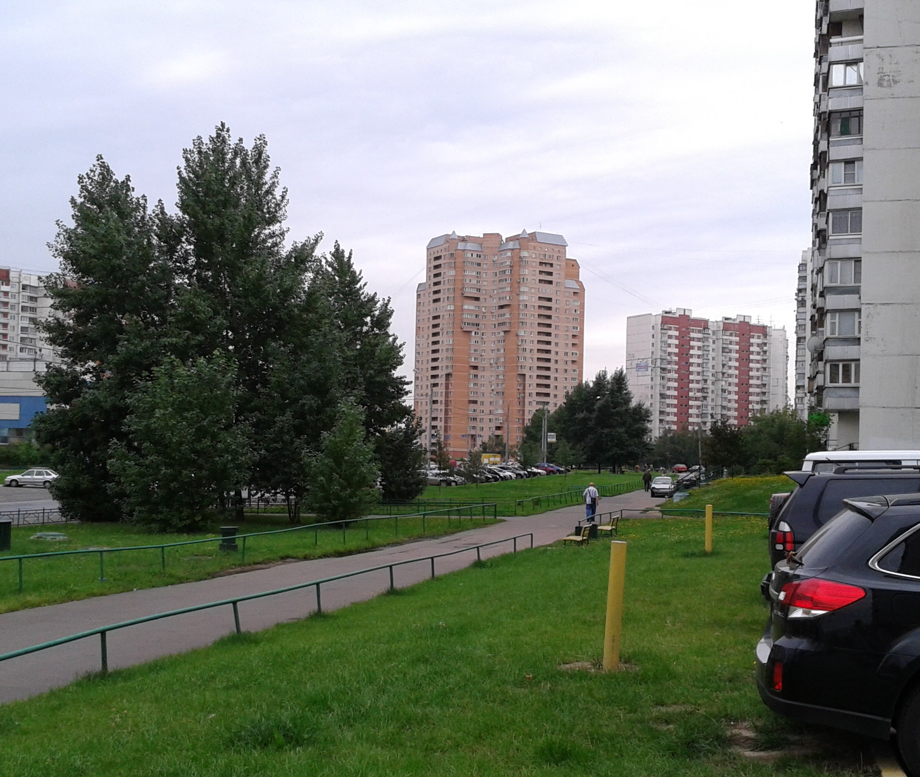 Новокосинская улица в 2013 г.